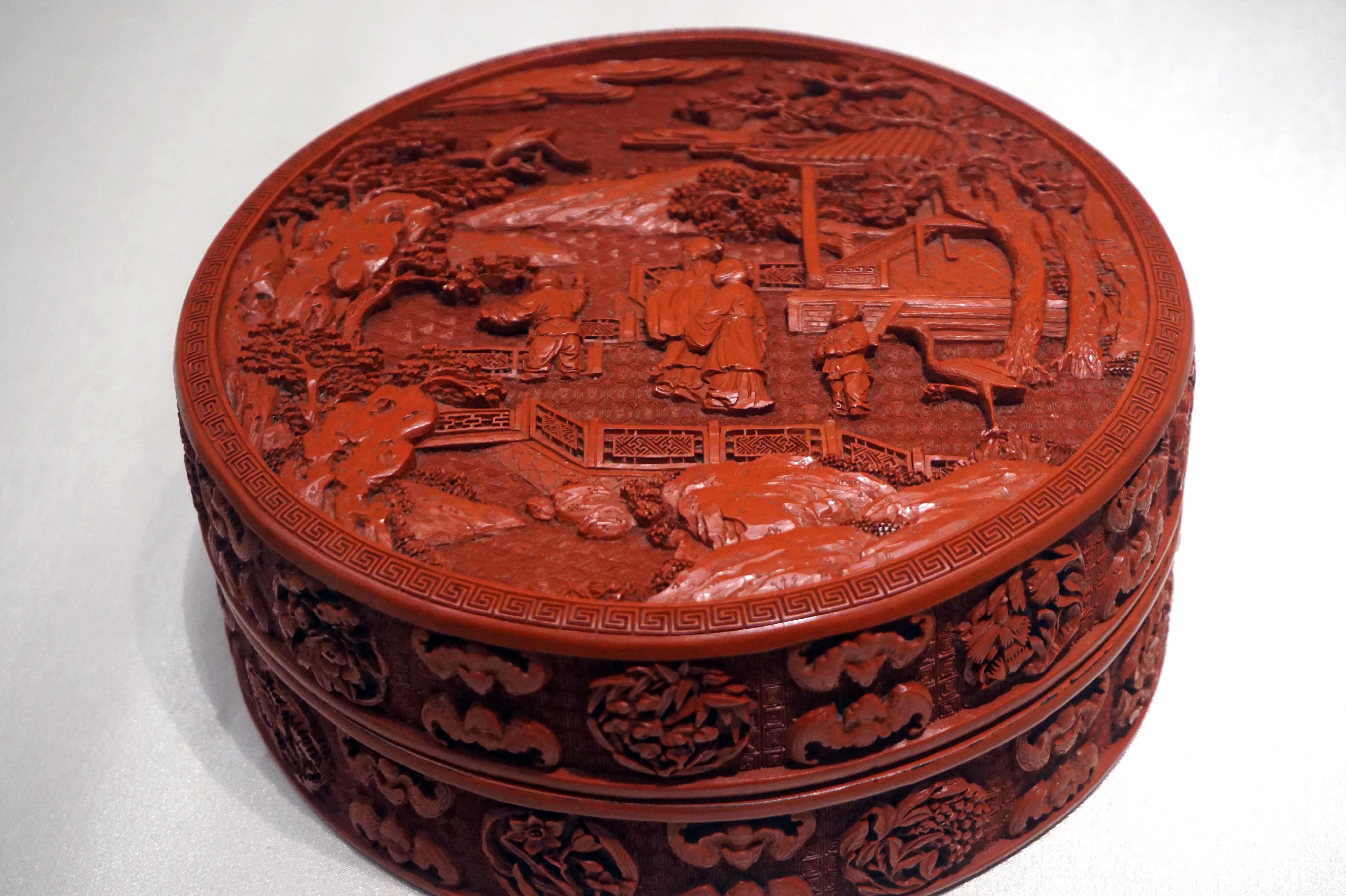 清乾隆剔红放鹤图宝盒。清宫造办处制，北京文物公司藏。